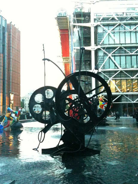 Jean Tinguely Beaubourg 2012 a Paris